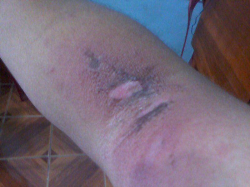 Concecuencia del insecto Paredrus irritans